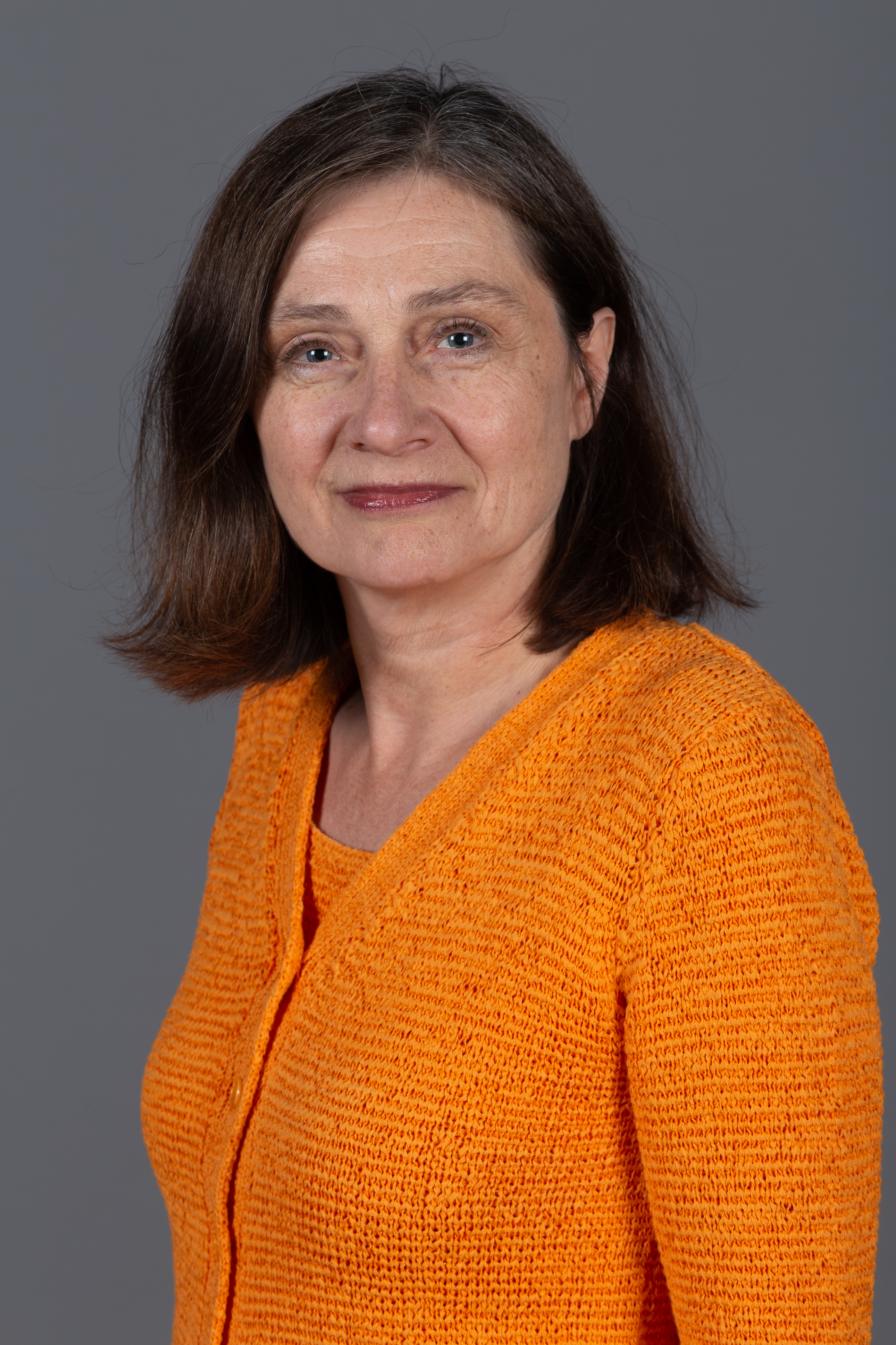 Abgeordnete(r) der Bürgerschaft der Freien und Hansestadt Hamburg Gabriele (Gabi) Dobusch